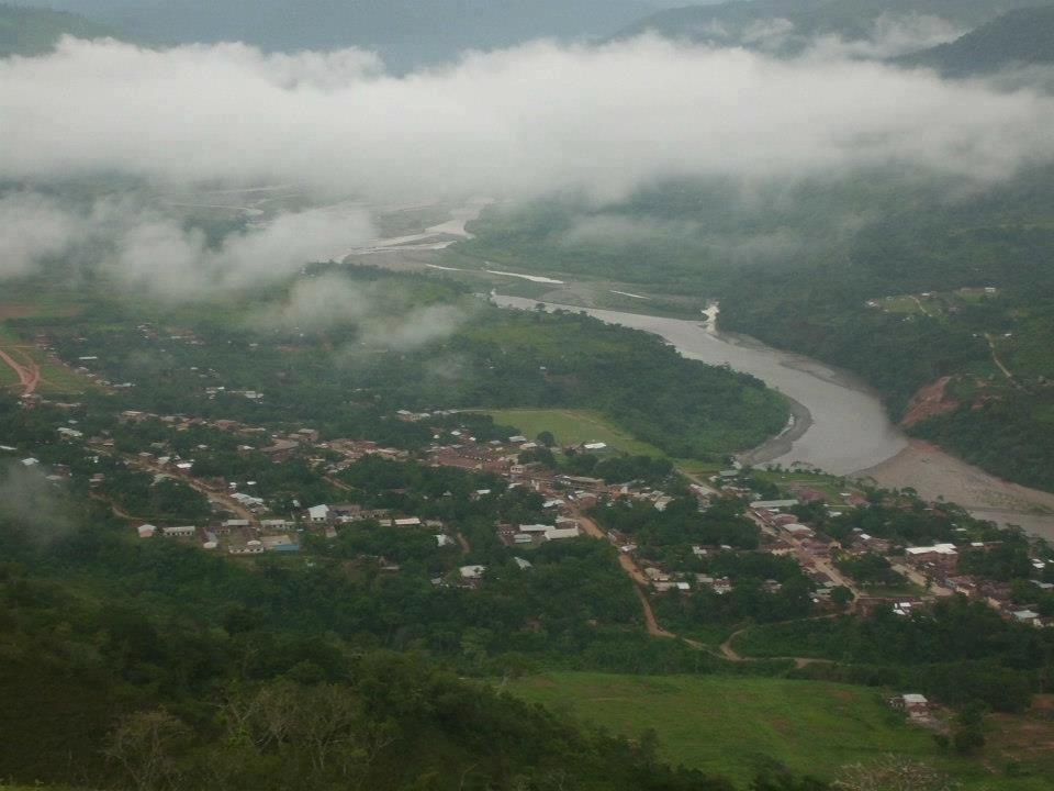 Mapiri vista desde el calvario